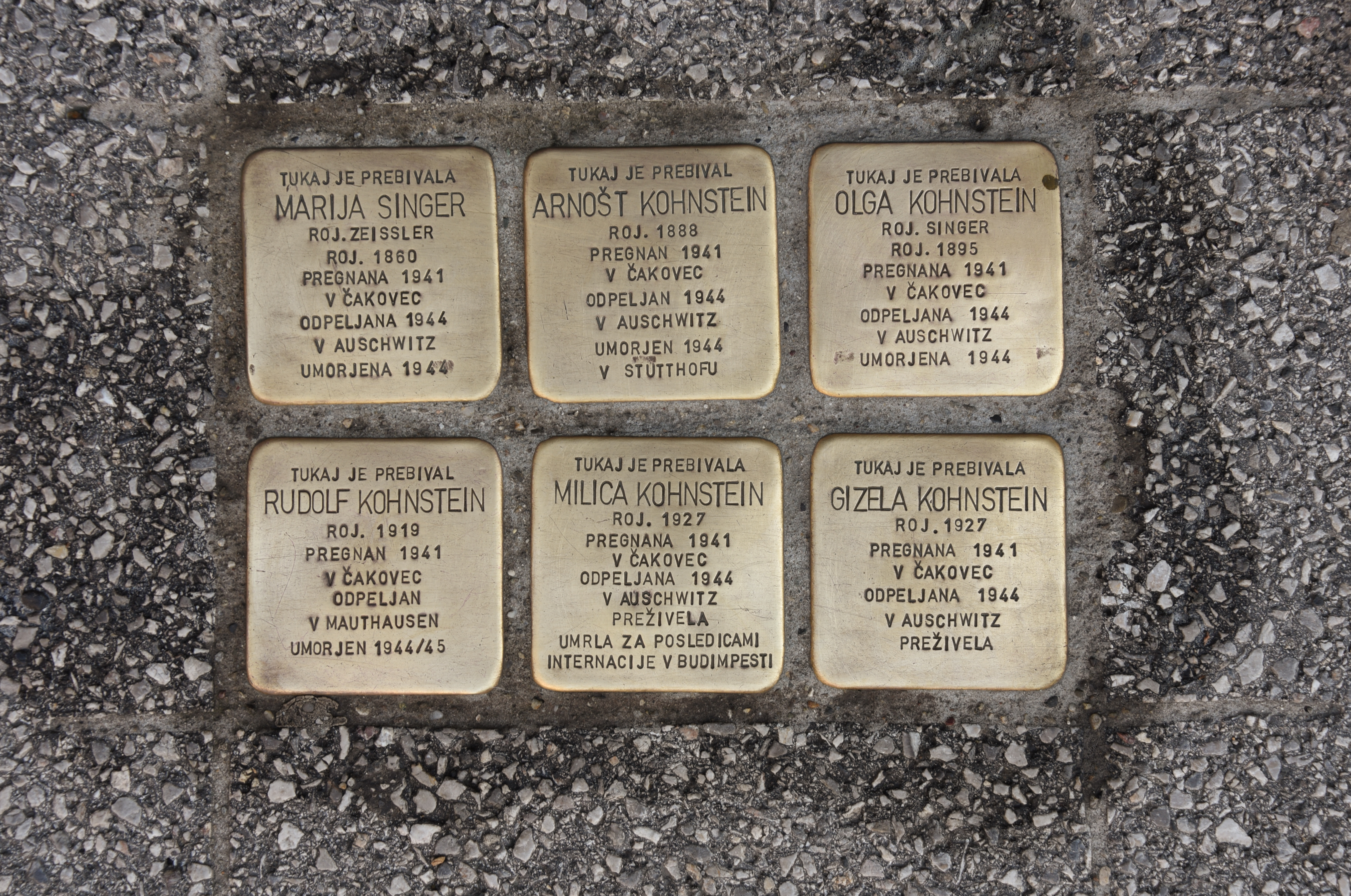 Stolpersteine in Maribor